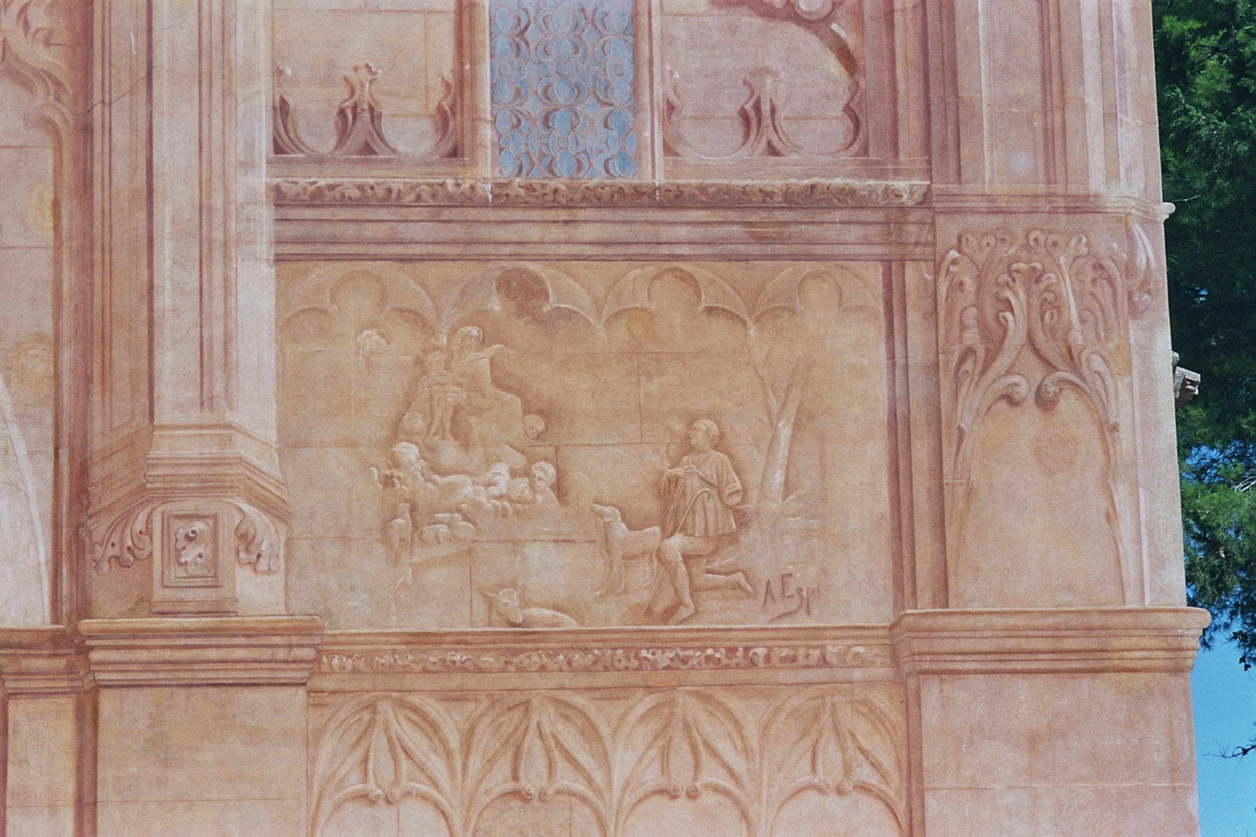 Detalle de la fachada del lateral derecho. Aparece la firma del pintor.